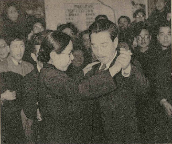 ダンスパーティでダンスを踊る野坂参三と野坂龍 日本共産党本部にて